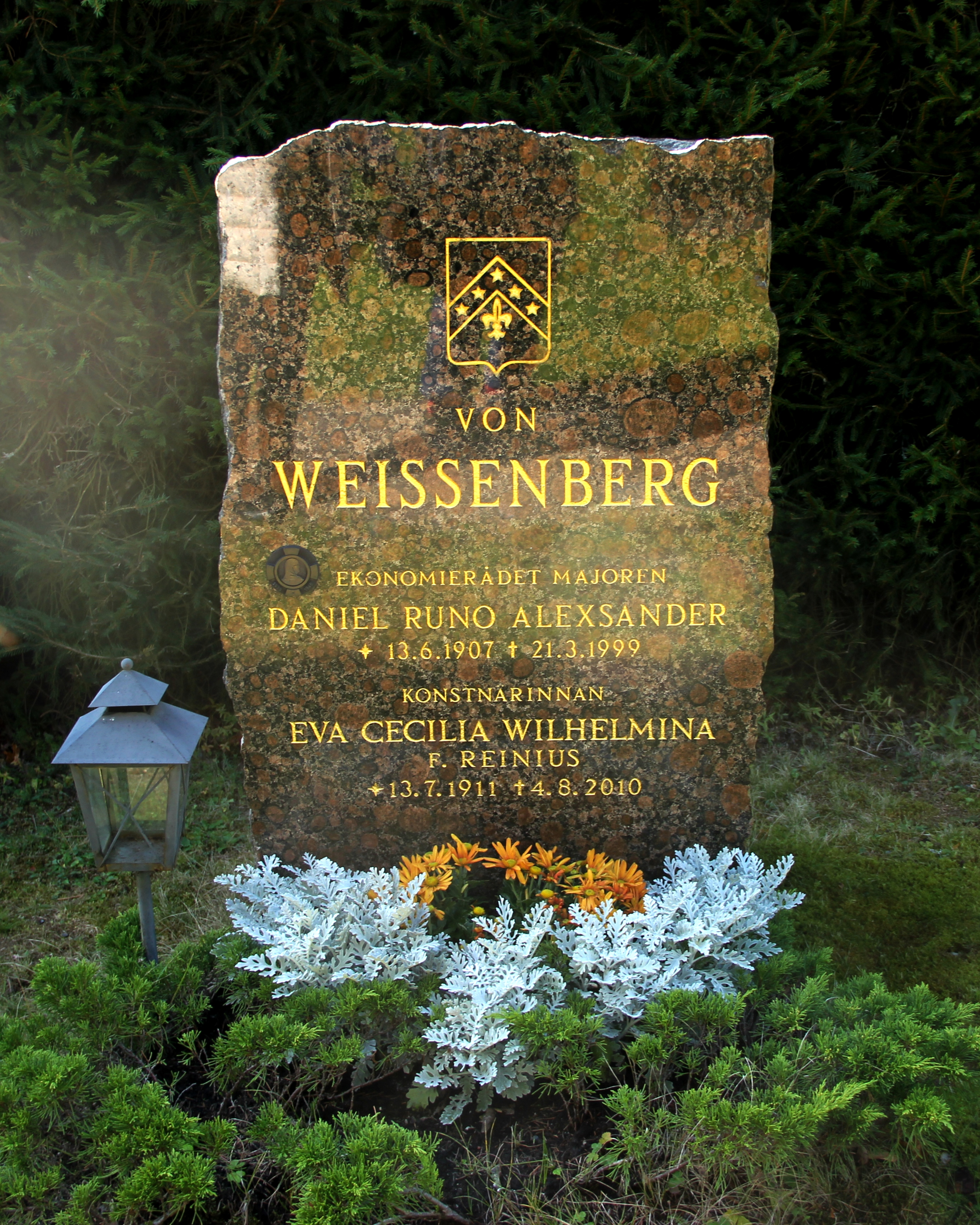 Kemiöläisen taiteilija Eva von Weissenbergin hautakivi Kemiön kirkon hautausmaalla.